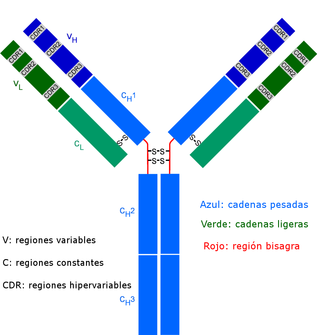 Estructura de las inmunoglobulinas G